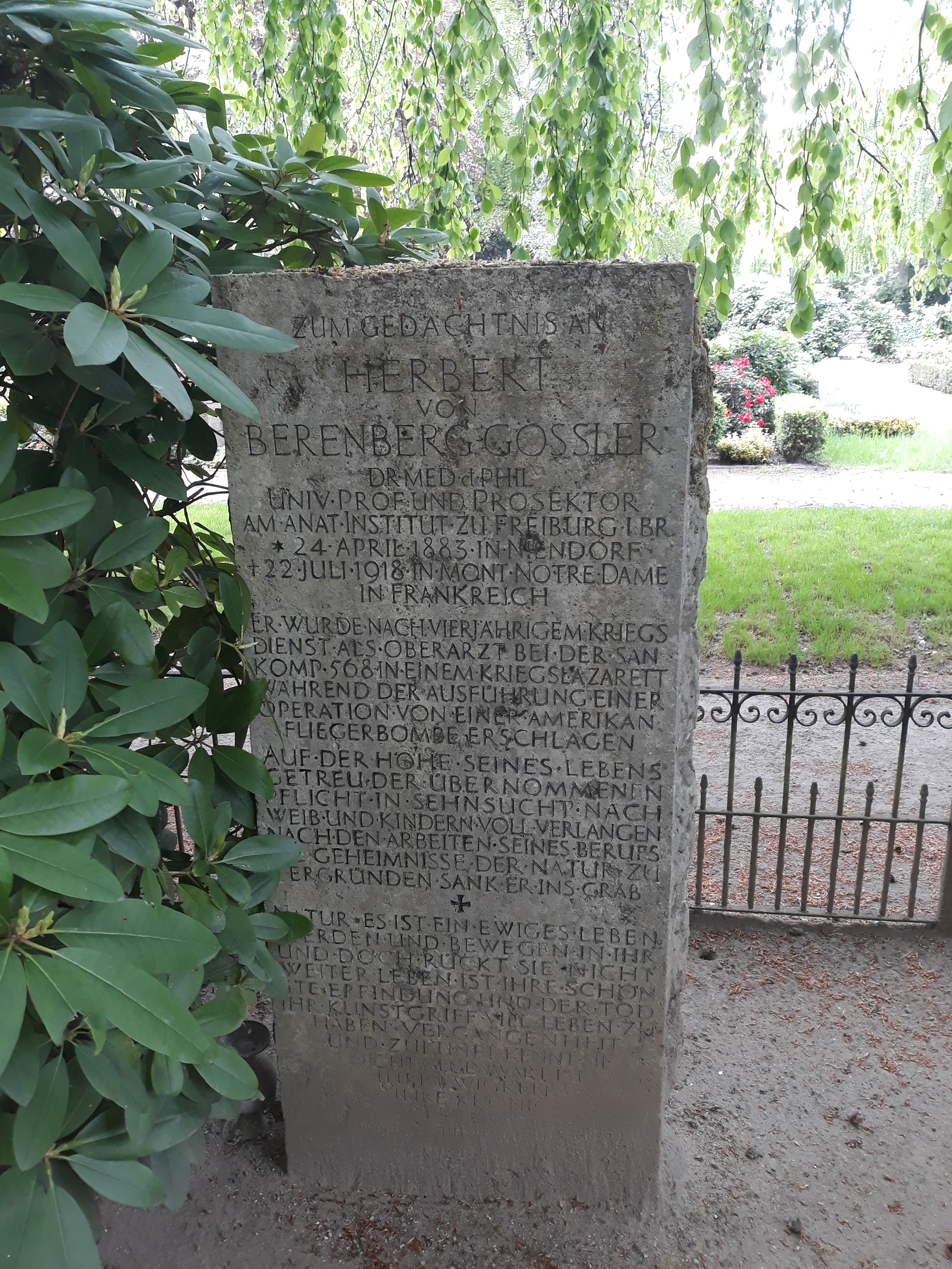 Gedenkstein des deutschen Anatomen Herbert von Berenberg-Goßler im Familiengrab auf dem Alten Friedhof Hamburg-Niedndorf.